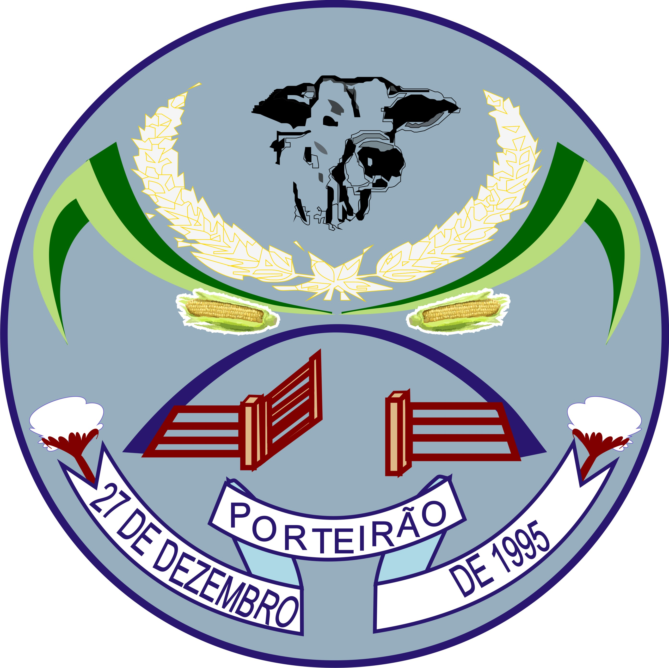 Brasão do Municipio de Porteirão , Goiás